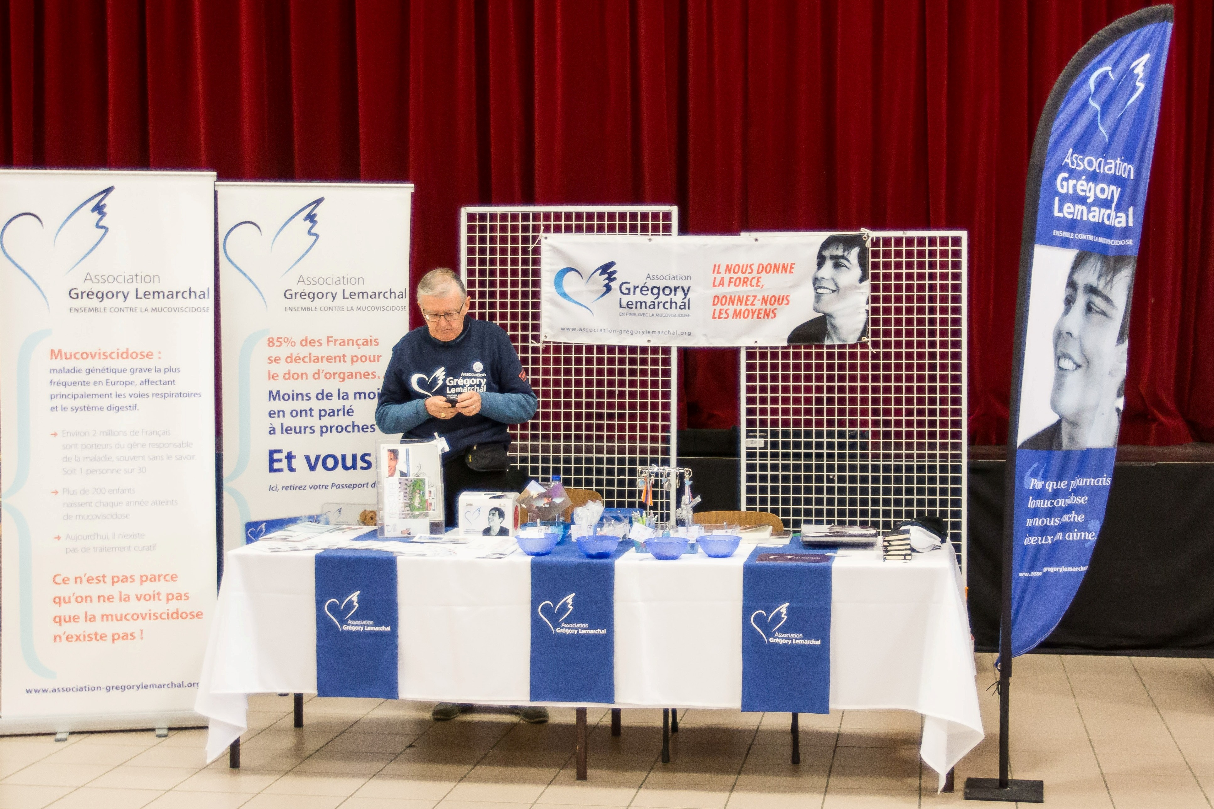 Journée de prévention, santé et sécurité, 16 mai 2015 / Villabé / France / France